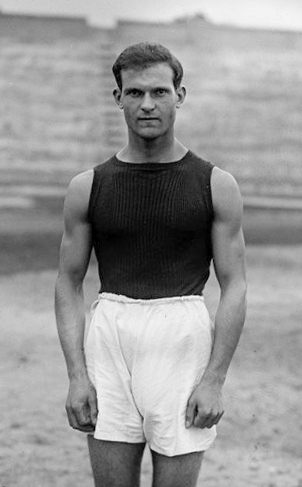 [Stade Pershing, athlètes de gauche à droite] Berrurier, [Marcel] Orfidan, Renard : [photographie de presse] / [Agence Rol]